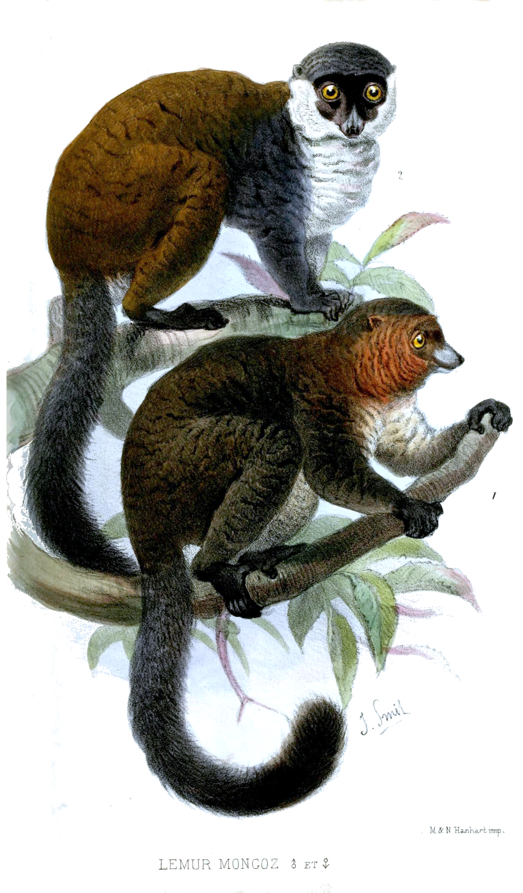 Lemur mongoz = Eulemur mongoz